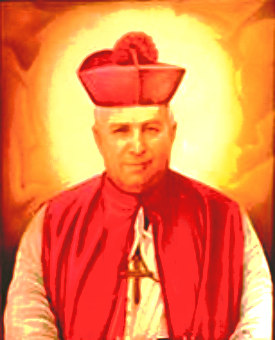 Imagen del obispo San Rafael Guízar y Valencia